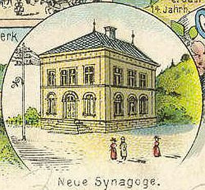 Neue Synagoge in Adelsheim im Neckar-Odenwald-Kreis (Baden-Württmeberg). 1889/90 in der Tanzbergstrasse/Ecke Untere Austrasse 1 errichtet und 1977 abgebrochen.